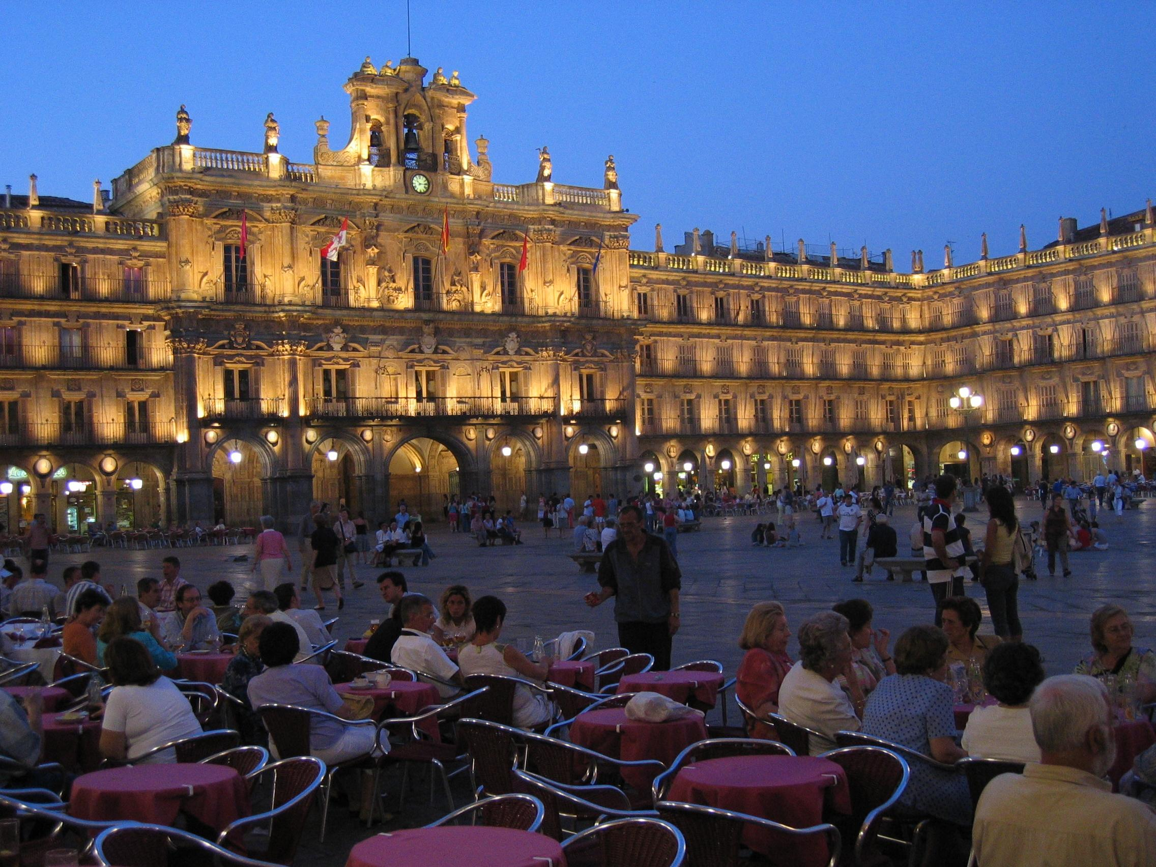 Salamanca, Plaza Mayor am frühen Abend